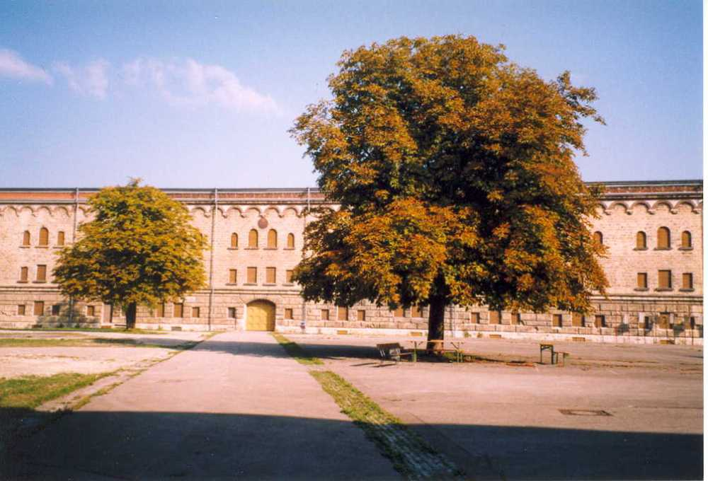 Die Wilhelmsburg der Bundesfestung Ulm